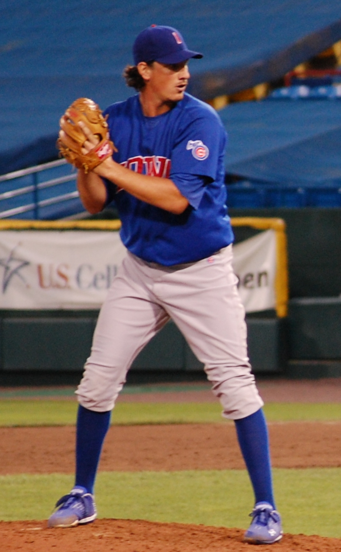 Jeff Samardzija